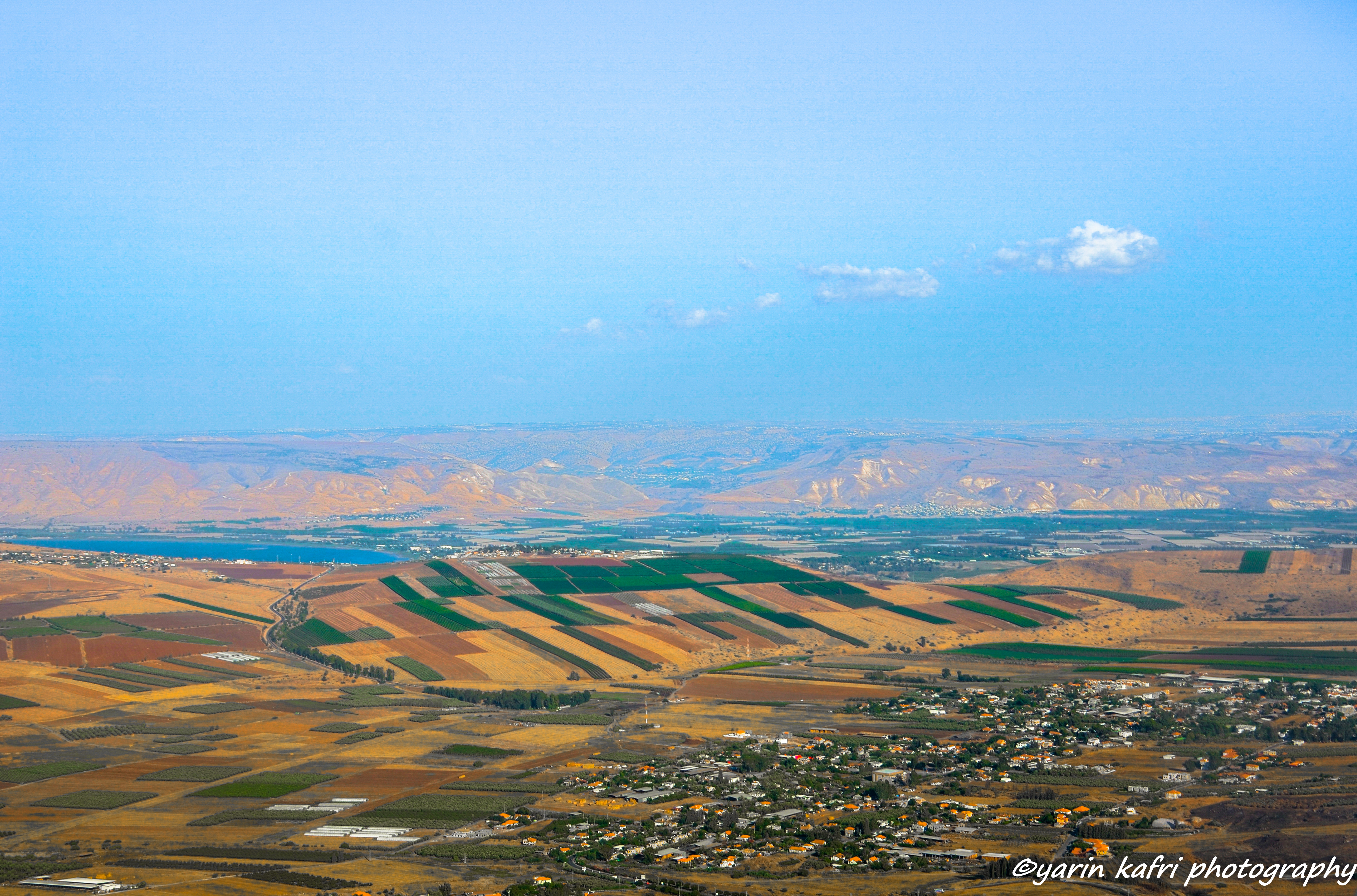 יבנאל היא מושבה בבקעת יבנאל, דרומית-מערבית לטבריה, שנוסדה ביום 7 באוקטובר 1901.